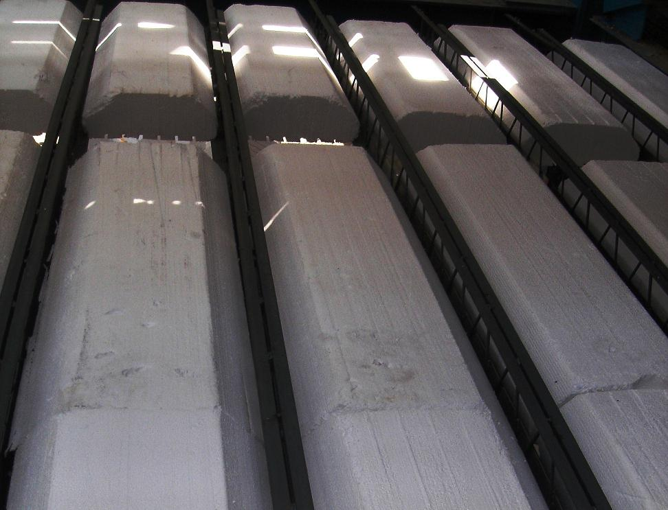 قالب ماندگار یونولیت